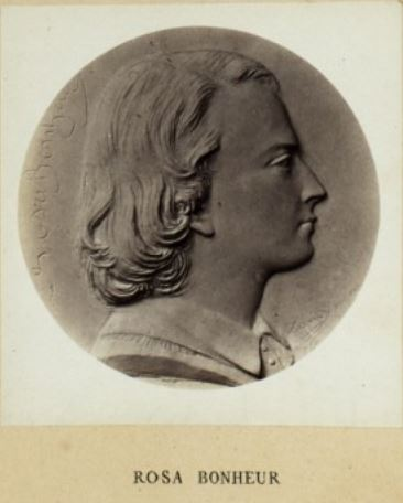 Rosa Bonheur, médaillon par David d'Angers in Les médaillons de David d'Angers (1788-1856) réunis et publiés par son fils David d'Angers, Robert (1833-1912). 1867 (BNF, Gallica)